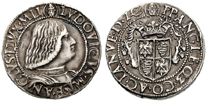 Italia, Milano. Ludovico Maria Sforza, detto il Moro. 1494-1499 AR Testone (9.65 g). (Monete di Milano) LVDOVICVS•M •SF•AN GLVS•DVX•MLI, bust con corazza dx, sopra testa vescovile PP• ANGLE• Q3•CO• AC• IANVE• D•7C, stemma coronato, sopra testa vescovile Italy, Milan. Ludovico Maria Sforza, detto il Moro. 1494-1499 AR Testone (9.65 g). LVDOVICVS•M •SF•AN GLVS•DVX•MLI, cuirassed bust right, small facing head above PP• ANGLE• Q3•CO• AC• IANVE• D•7C, crowned arms; small facing head above. Crippa 2; Biaggi 1578; Morosini III, pg. 269, 5.